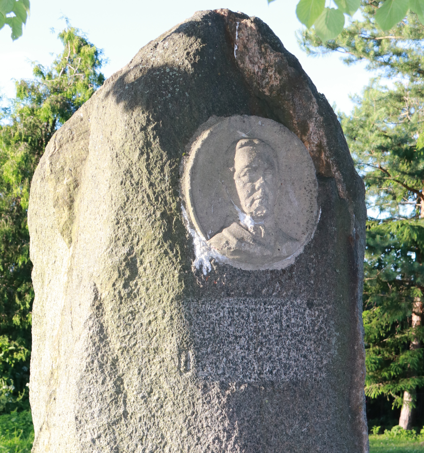 Denkmal Dewiescheit Lötzen Relief 2019